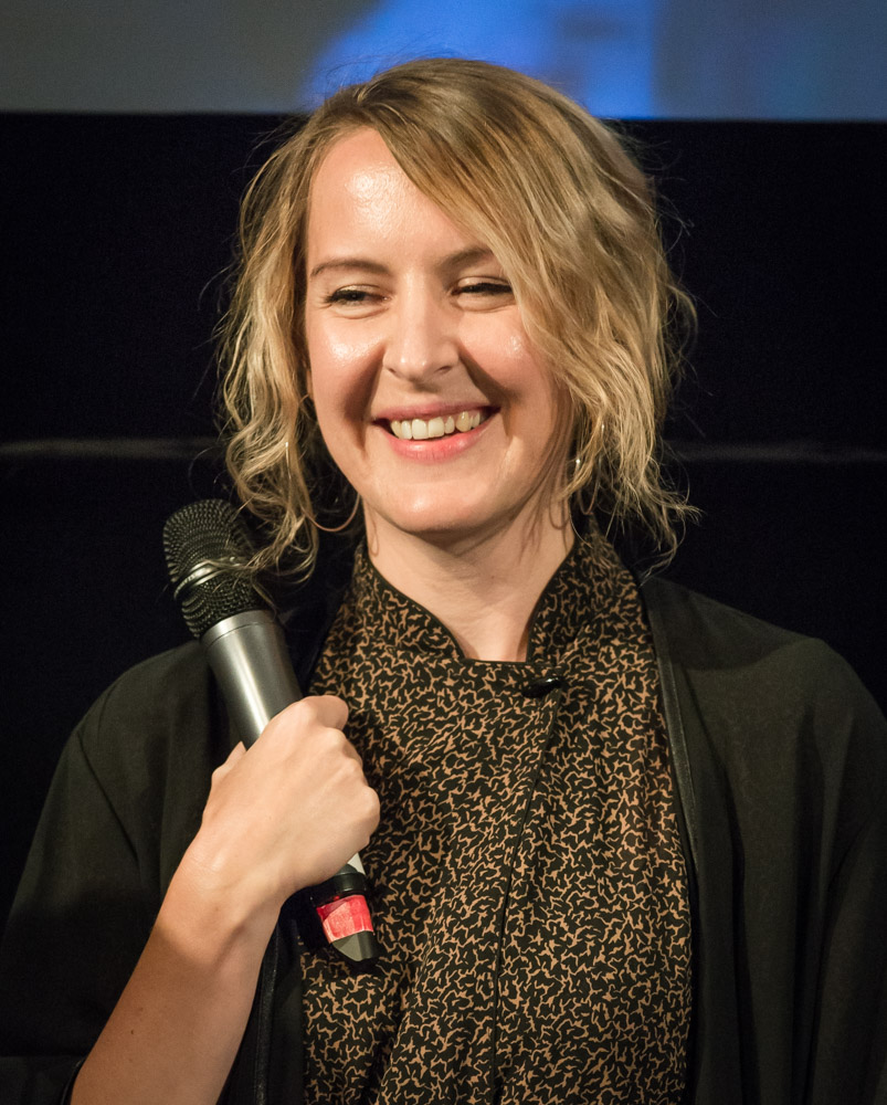 Sanna Lenken under presentationen av den Svenska filmhösten i Filmhuset i Stockholm den 17 augusti 2015.